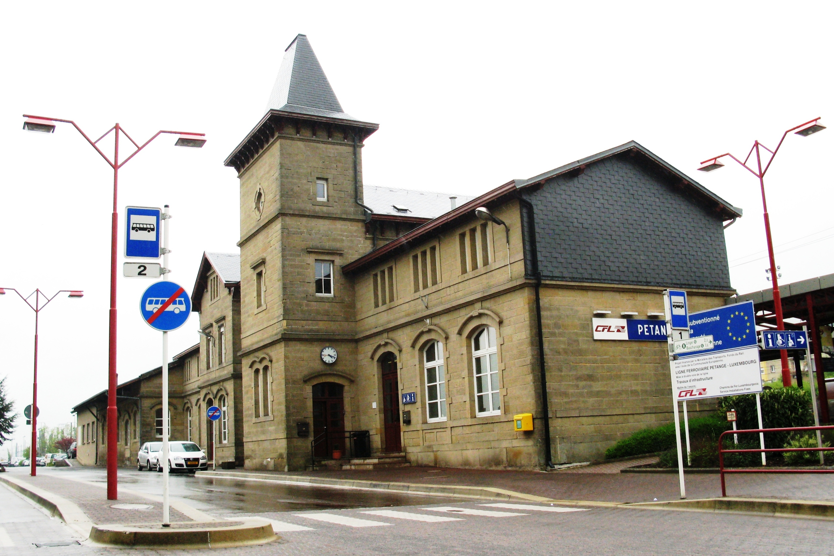 D'Gare vu Péiteng vu vir gesinn (2010).